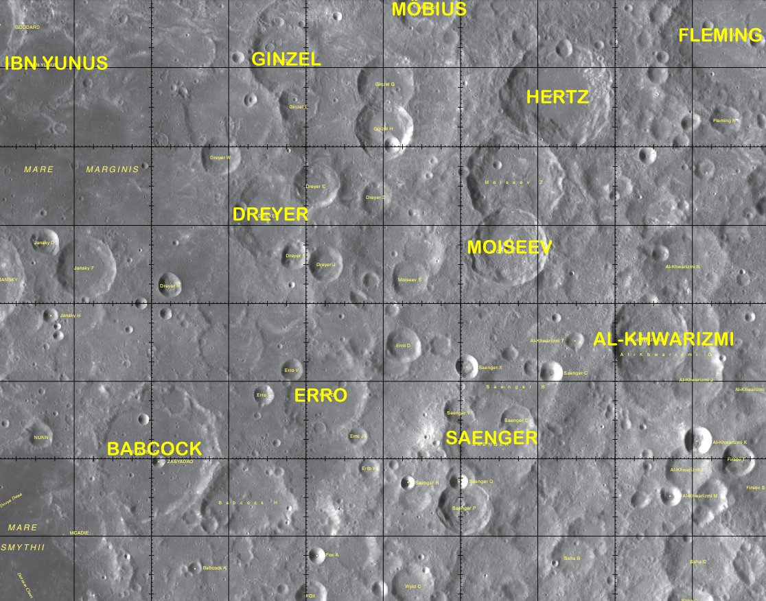 Cráter lunar Erro. Localización. (Imagen LROC)